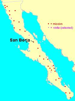 Mapa de San Borja, Baja California Peninsula